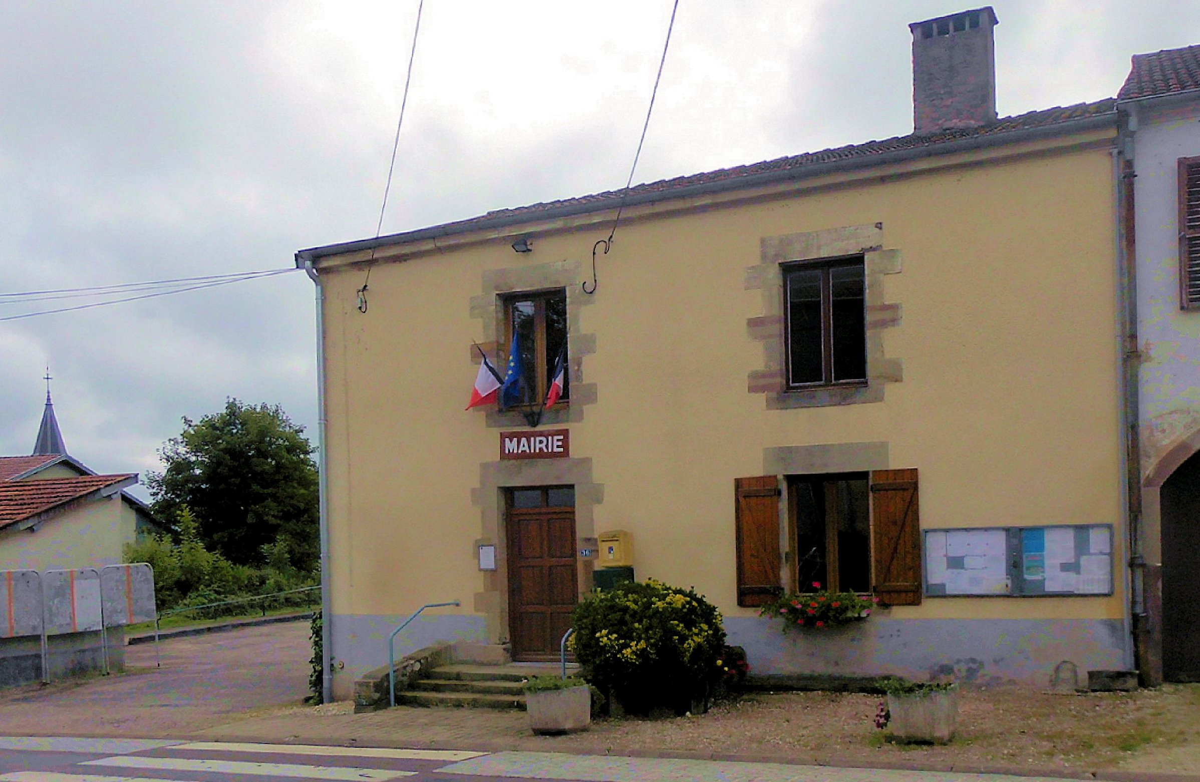 La mairie d'Ambiévillers (33. Grande rue)